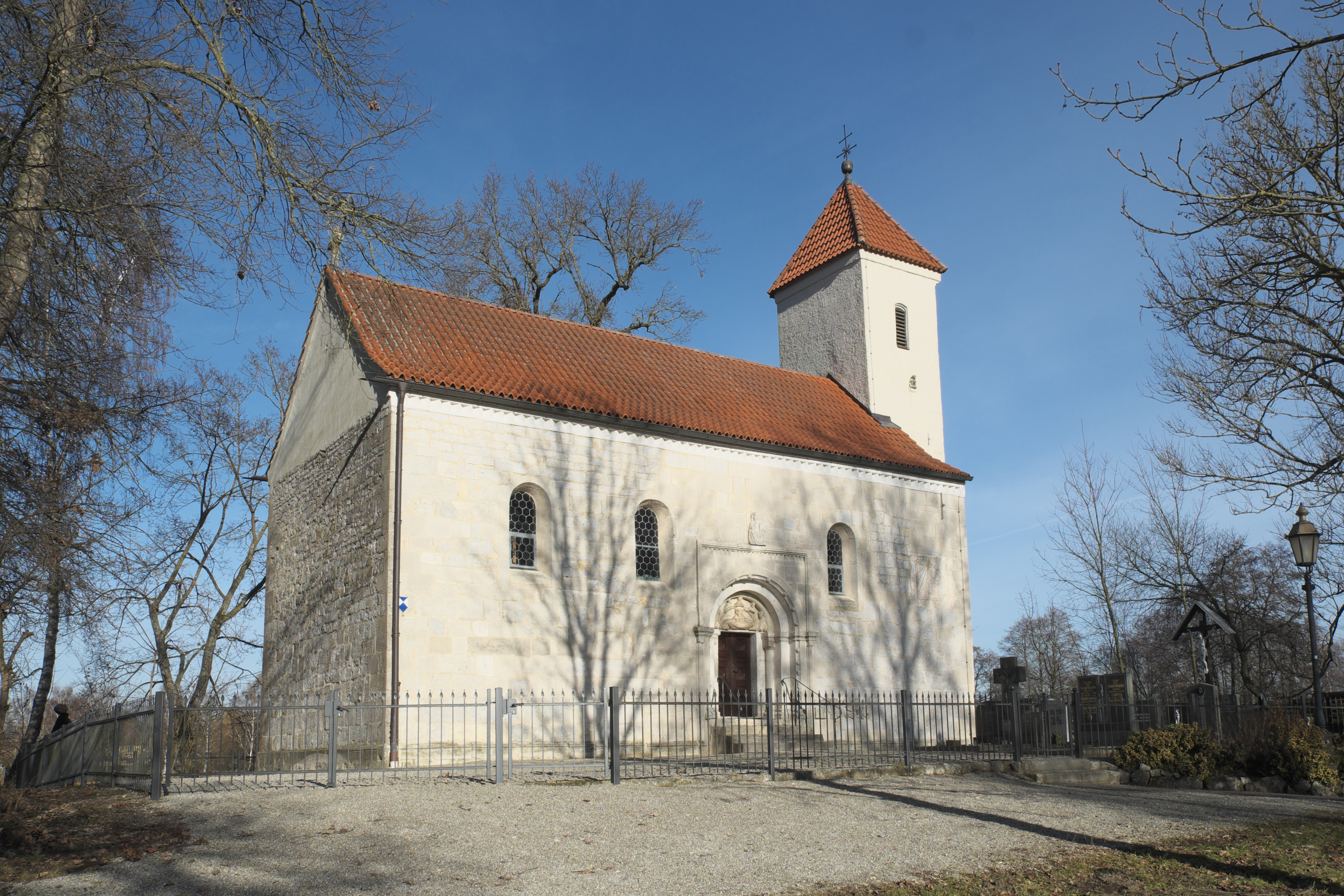 Katholische Pfarrkirche St. Ulrich in Ainau (Geisenfeld) im Landkreis Pfaffenhofen an der Ilm (Bayern/Deutschland)